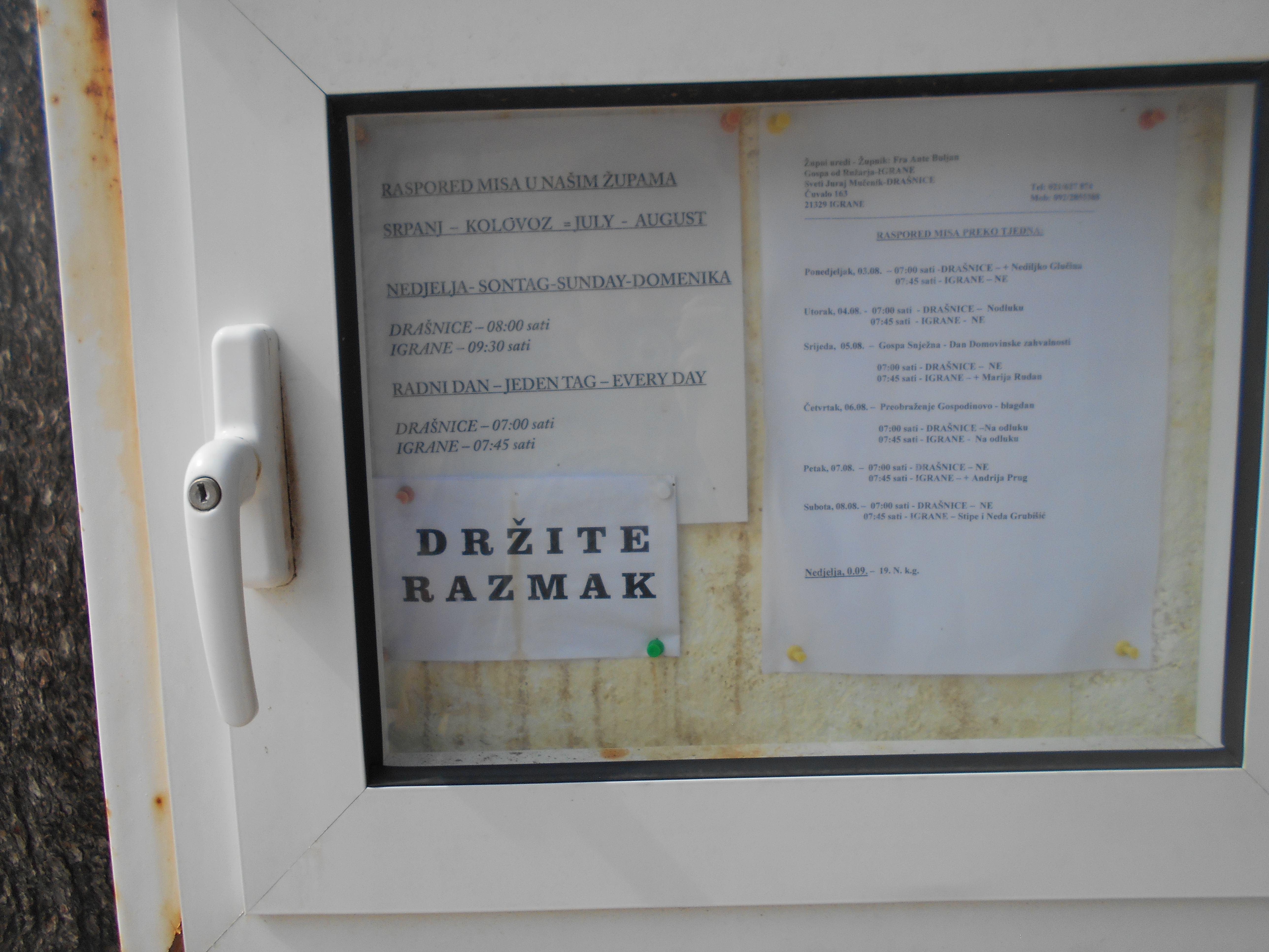 Upozornění na povinnost držení společenského odstupu v kostele v Drašnici